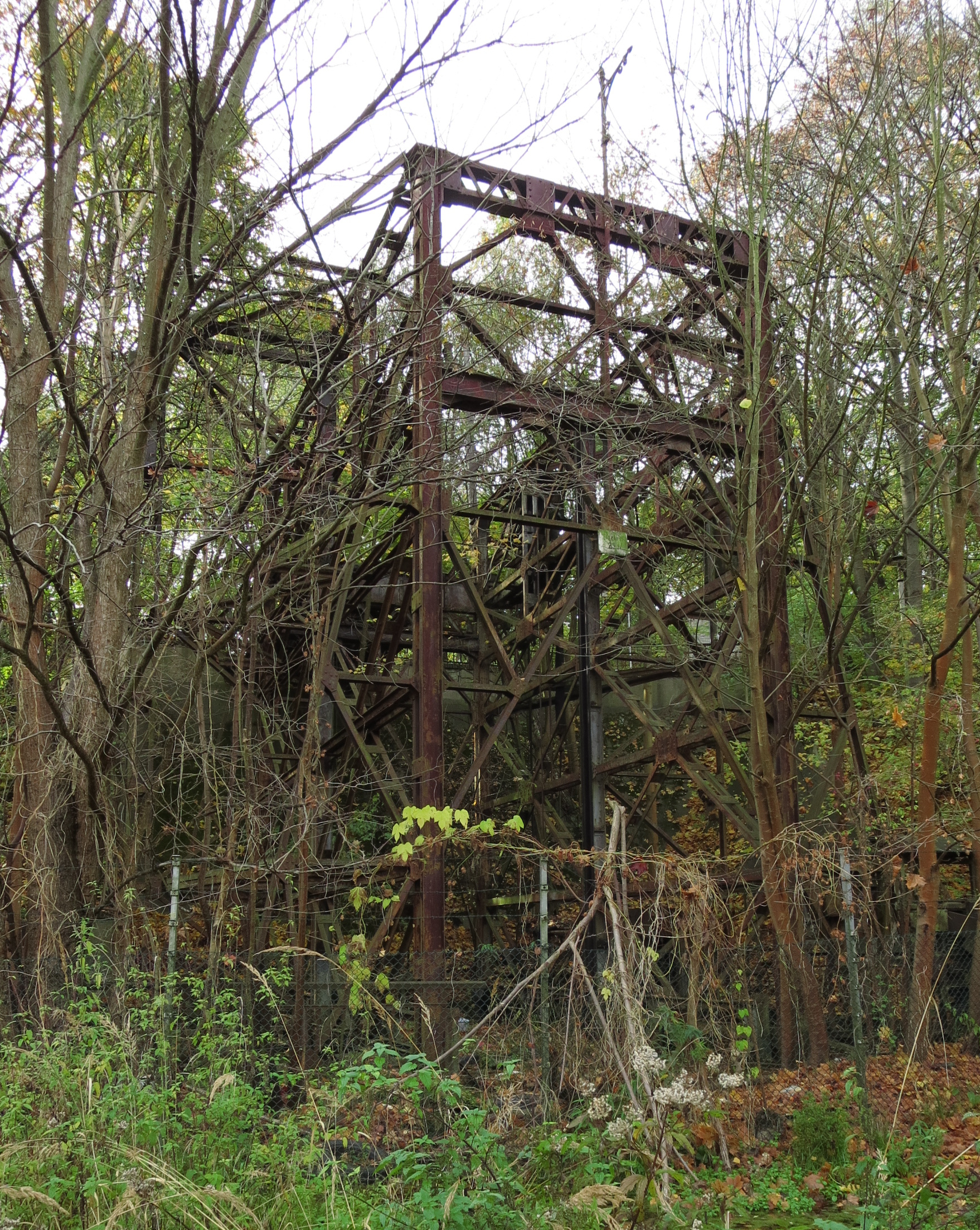 Hufnagelfabrik, Waggonfahrstuhl